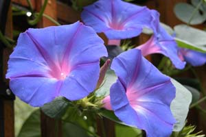 Ipomoea grandiflora Photo prise le 3 septembre 2005 à Saint-Lazare, Québec, Canada. Sous gfdl Utilisateur:Arbramour septembre 2005